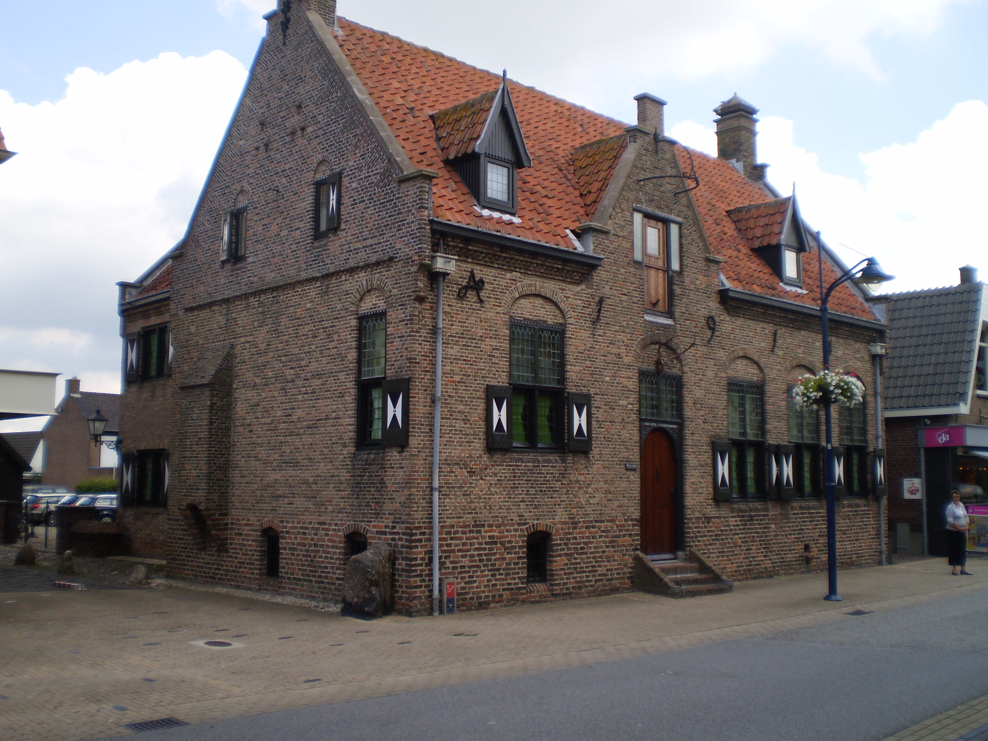 Woudenberg, Voorstraat 12, Schoutenhuis